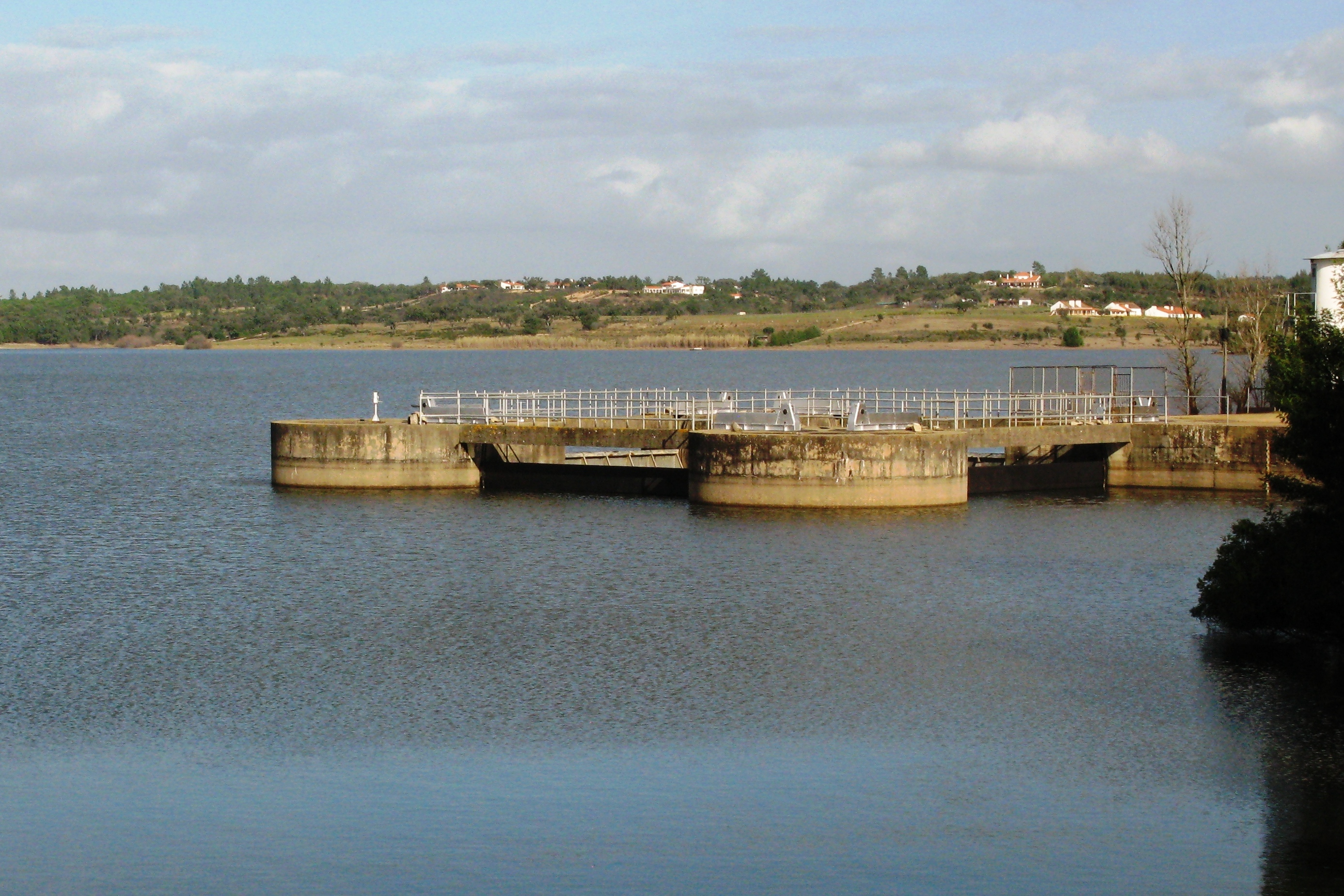 Barrage de Montargil. Prise d'eau pour canal d'irrigation et décharge